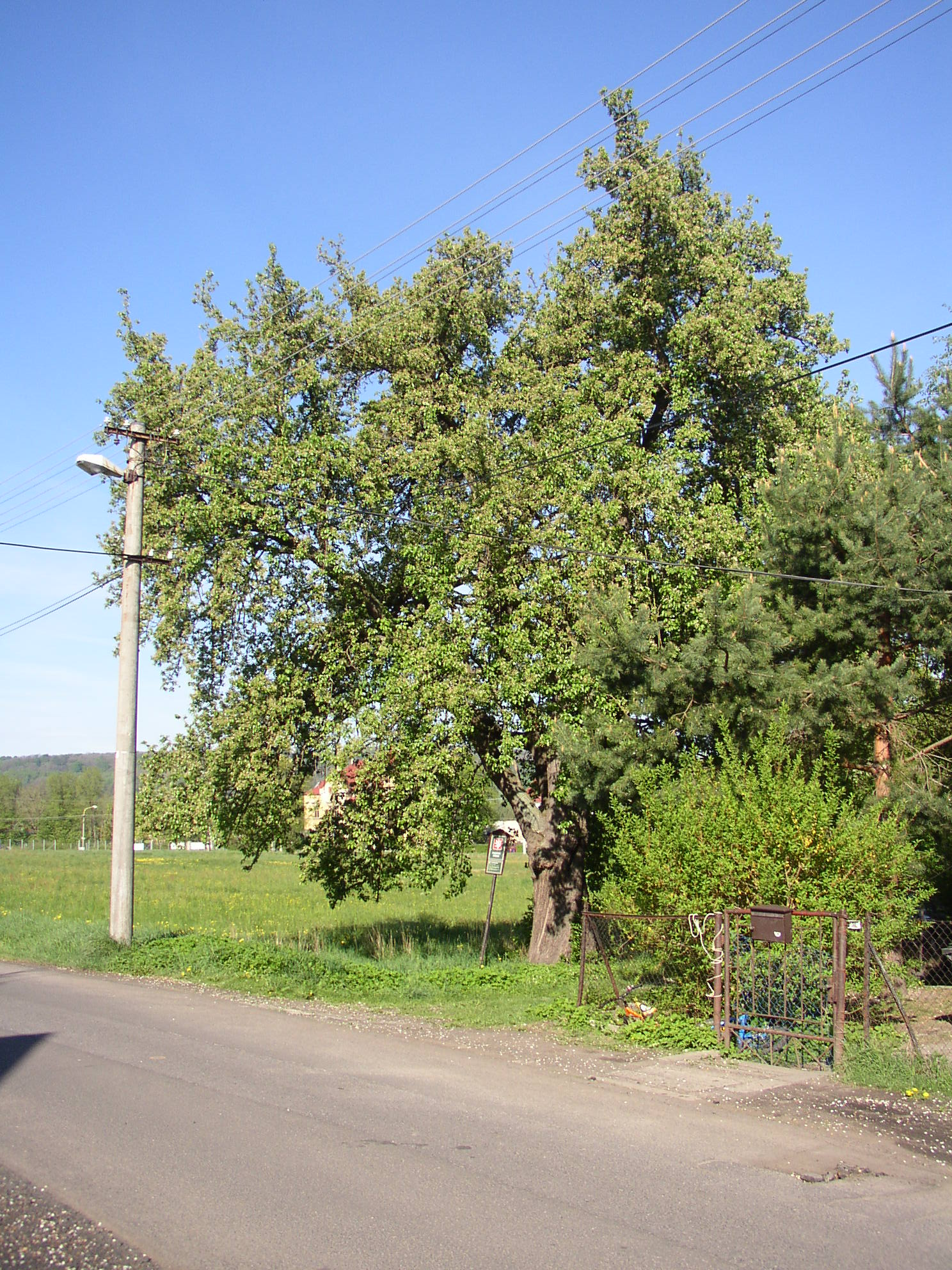 Varnsdorfská hruška, Varnsdorf, okres Děčín, Ústecký kraj, Česká republika